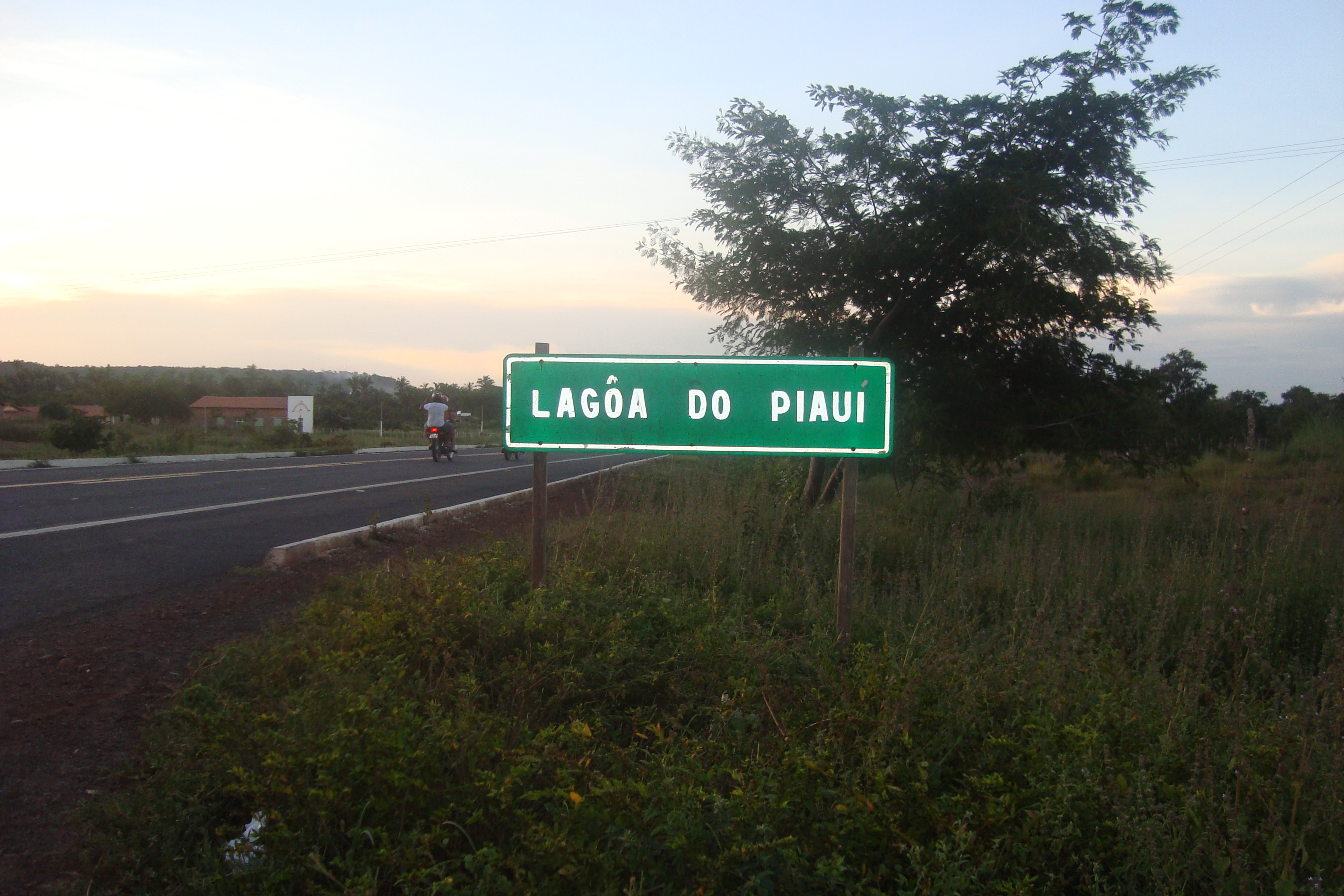 Placa localizada na BR que atravessa Lagoa do Piauí